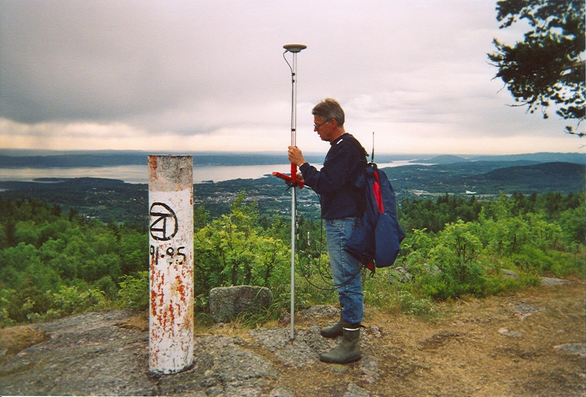 Høydemåling av Bergsåsen juni 2004